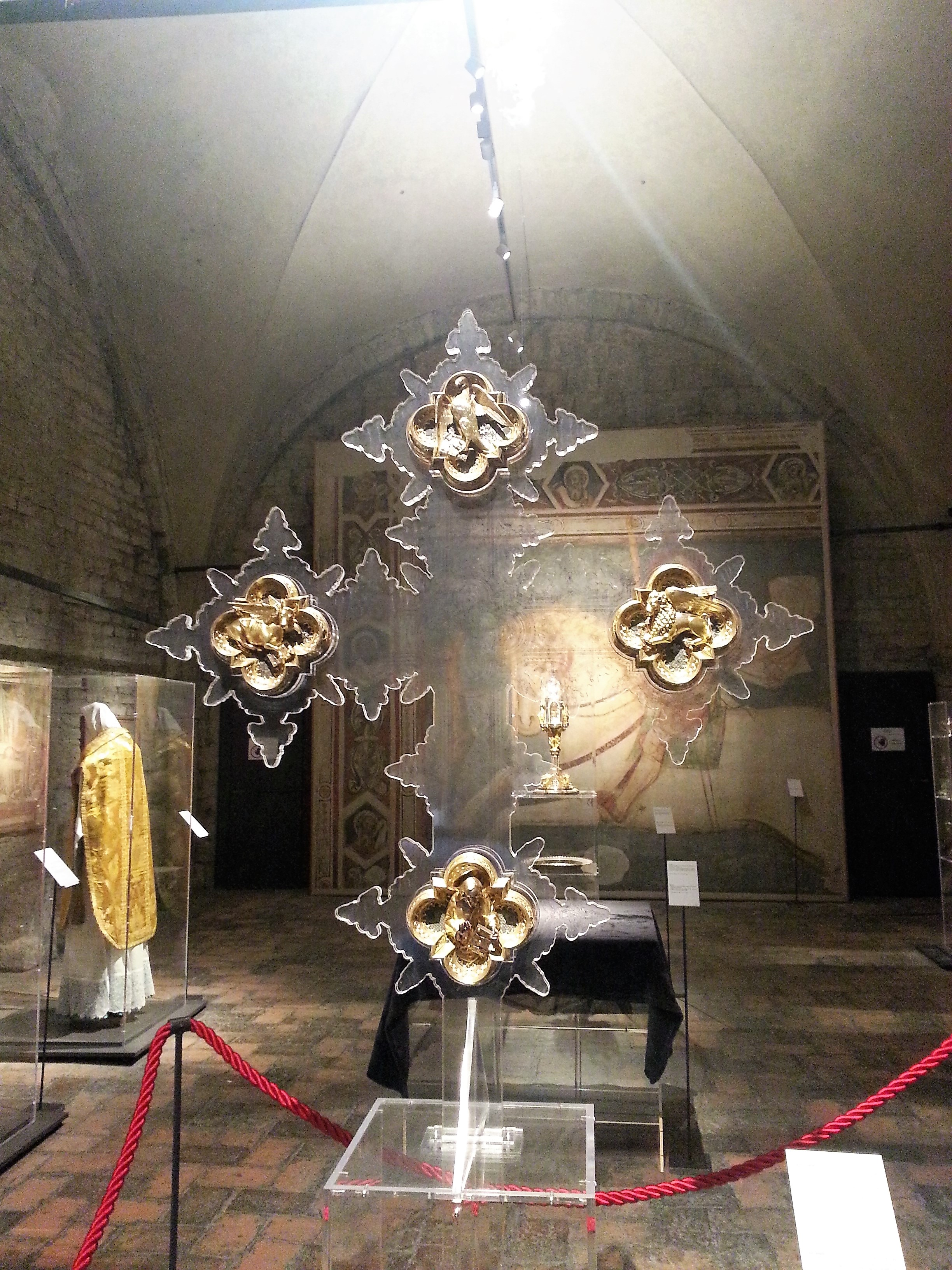 Tesori di Santa Maria Maggiore - Il crocifisso opera del 1392 di Andreolo de Bianchi